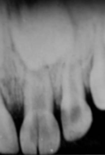 fracture couronne